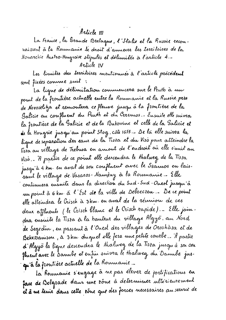 Pagina cu revendicarile teritoriale ale României din tratatul cu Antanta